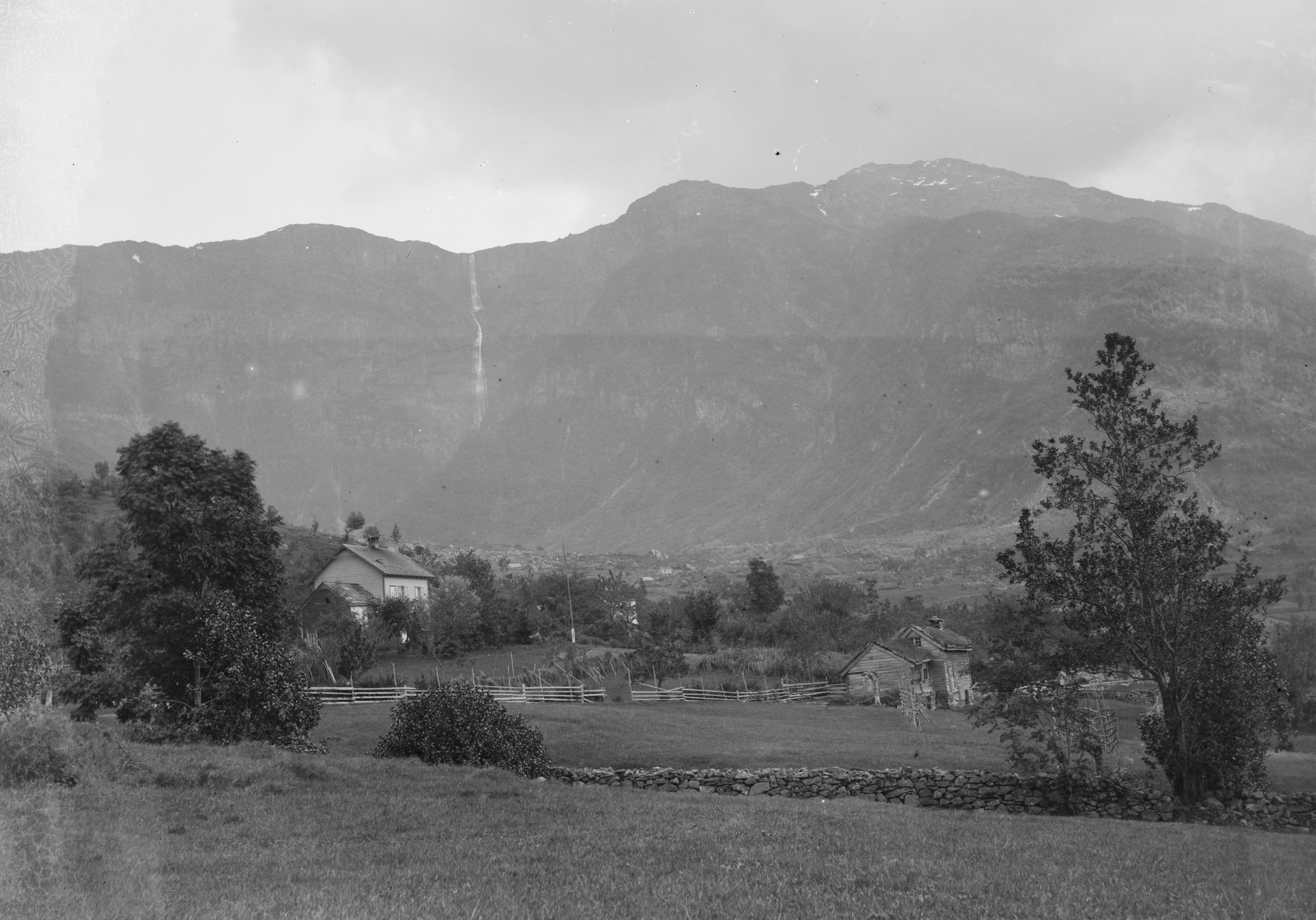 Skøiens katalog: Landeveisparti fra Lofthus og Skrikefossen Påskrift negativ: 376. Lofthus med Skri[uleslig], Hardanger Skøien Christiania Påskrift negativ: 276 Ullensvang [Riksantikvaren] Påskrift konvolutt: B-276 Ullensvang. Lofthus. Opedal med Skeikofossen [Riksantikvaren] Sted: Lofthus,Opedal,Skrikjofossen Kommune: Ullensvang Fylke: Hordaland Tagger: landskap bebyggelse foss